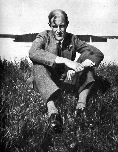 Sten Selander vid Dalarö Skans